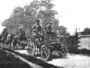 Andre Michelin au Paris-Amsterdam-Paris en 1898 (Histoire de l'Automobile, Pierre Souvestre, 1907, p.358)